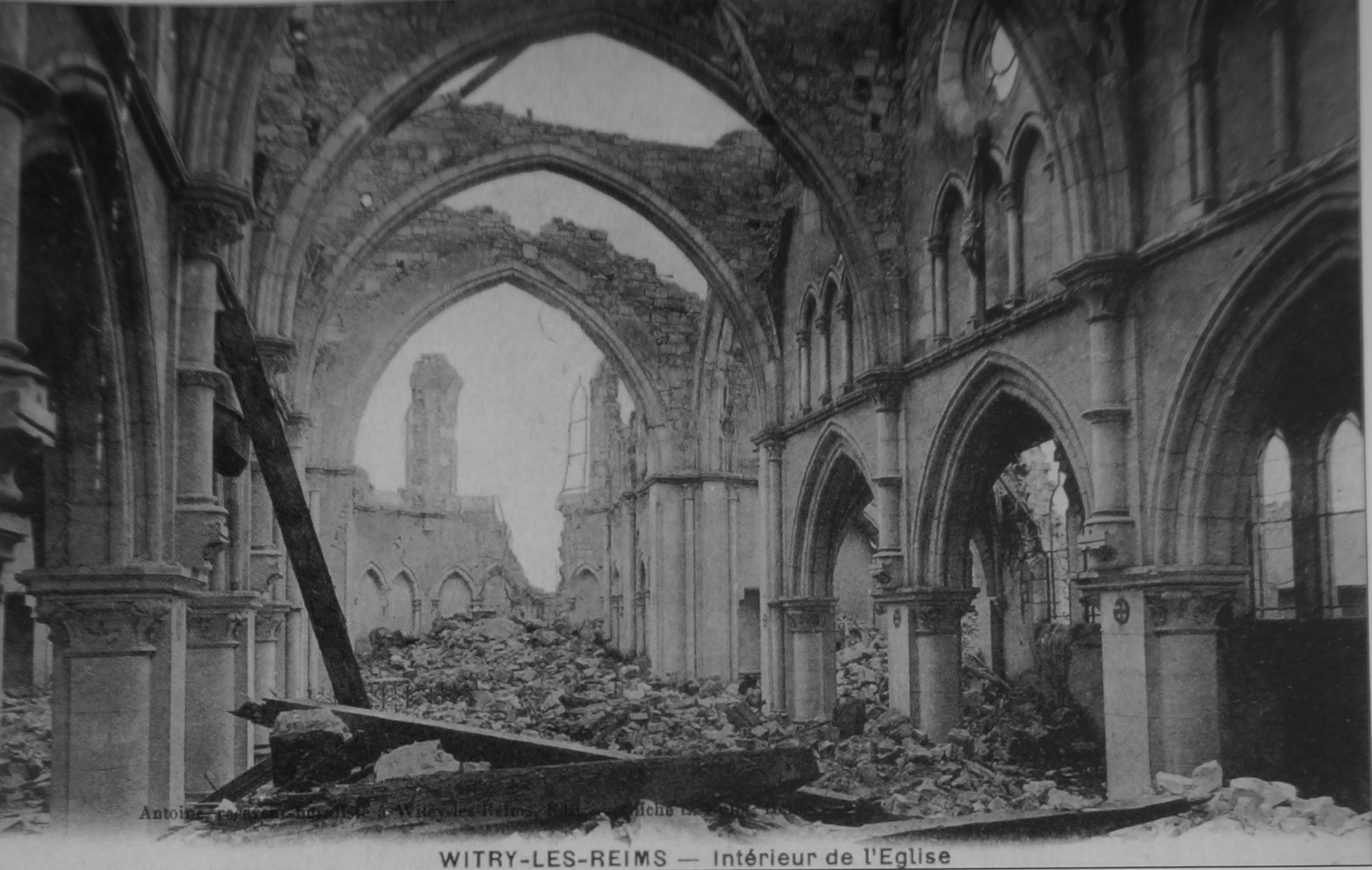 dégats dans l'église.